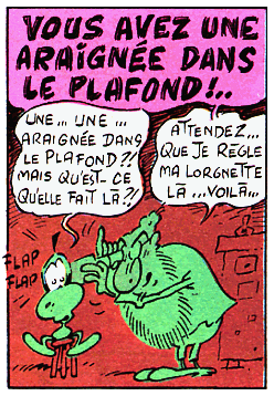 65ème image de « Une araignée dans le plafond » du Concombre masqué : Dr Freud examine le Concombre au sujet d'un bruit dans la tête.